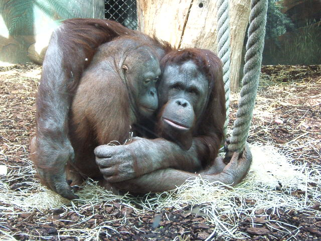 photo de l'auteur d'un orang-outang au jardin des plantes